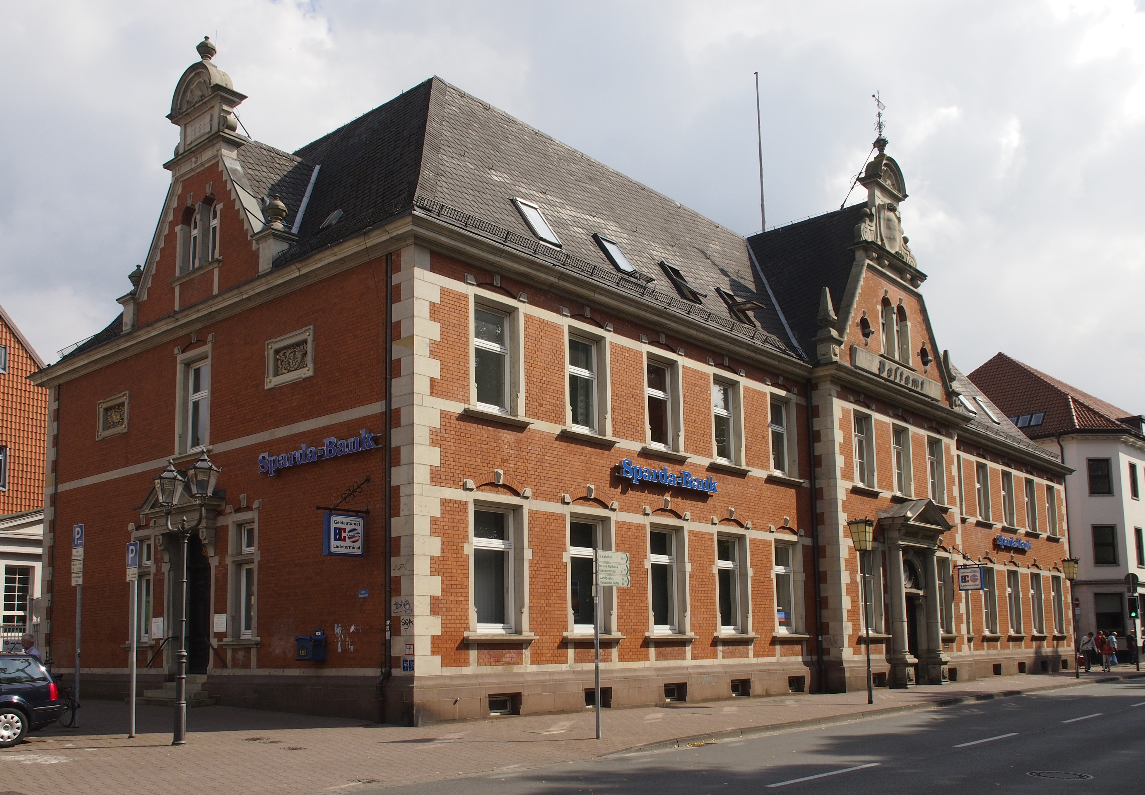 Ehemaliges Postgebäude, vormals der Reichspost, erbaut 1886/87